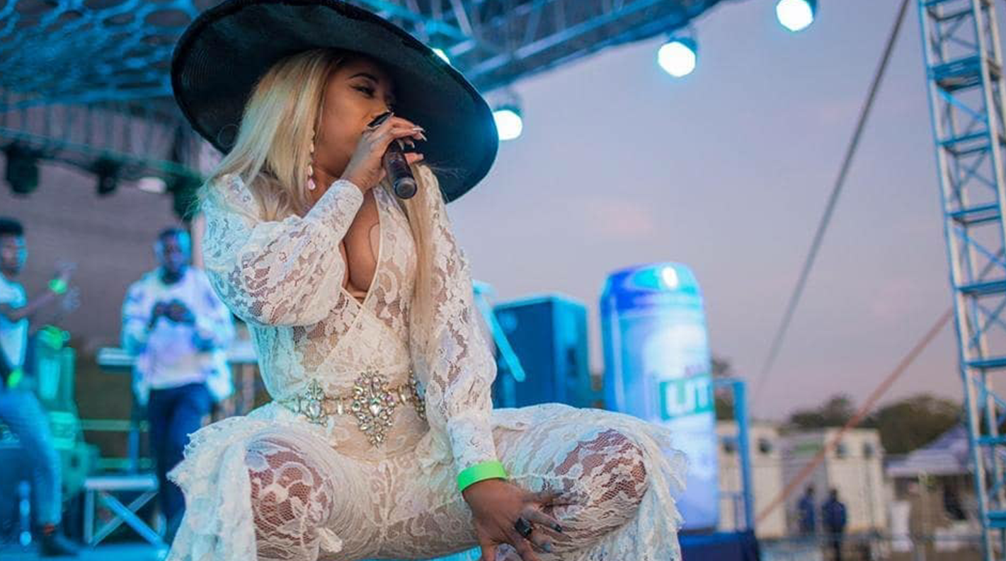 Chi-Chewa: Woyimba waku Zambia pa siteji